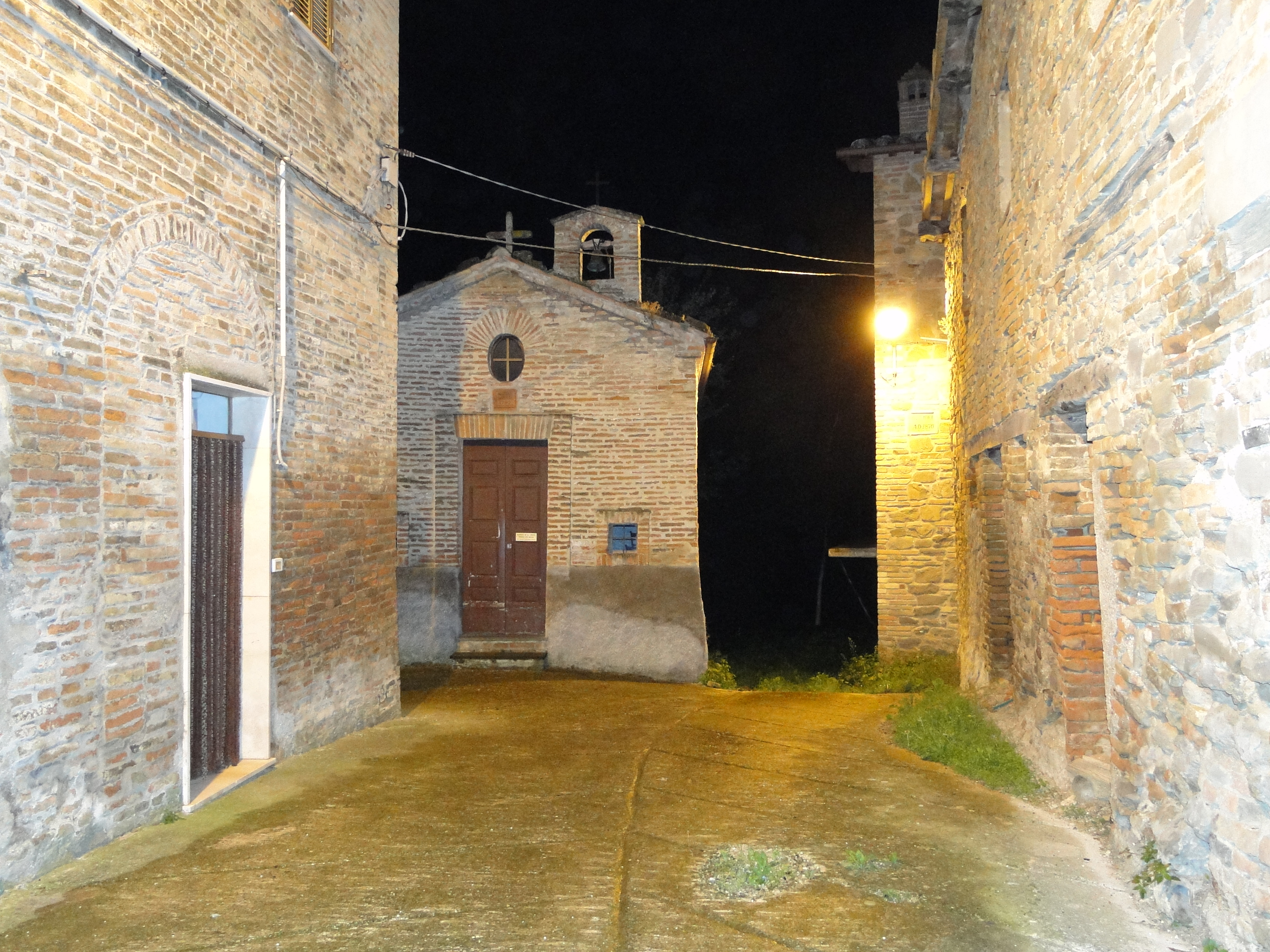 Chiesuola della Madonna della Cerqua (nella frazione Villa Cese di Montefortino in provincia di Fermo)